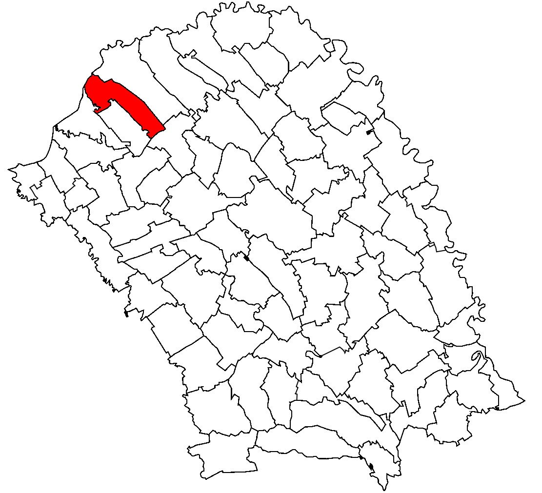 Categorie:Hărţi ale judeţului Botoşani